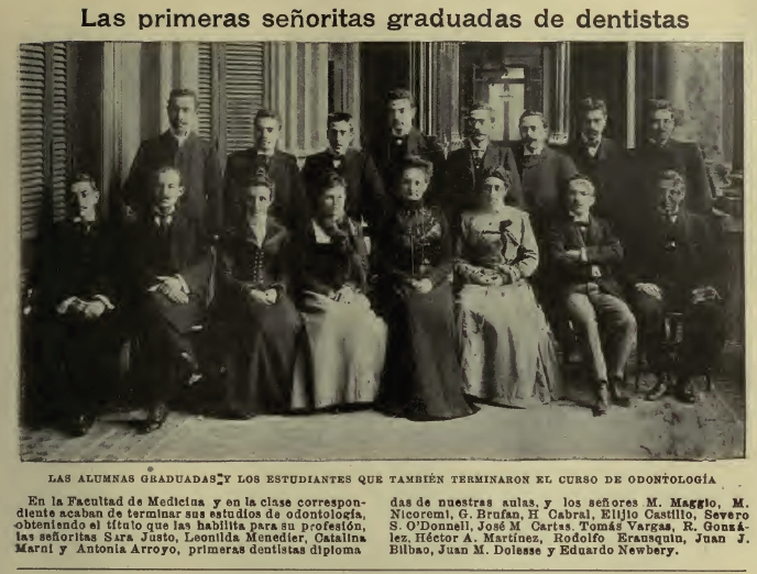 Primeras dentistas argentinas: Sara Justo, Leonilda Rosa Menedier, Catalina Marni y Antonia Arroyo